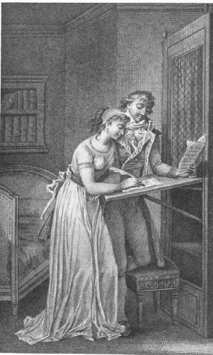 Illustration pour le roman de Pierre Choderlos de Laclos' Les Liaisons dangereuses Lettre 115 Valmont dictant une lettre à Cécile pour Danceny